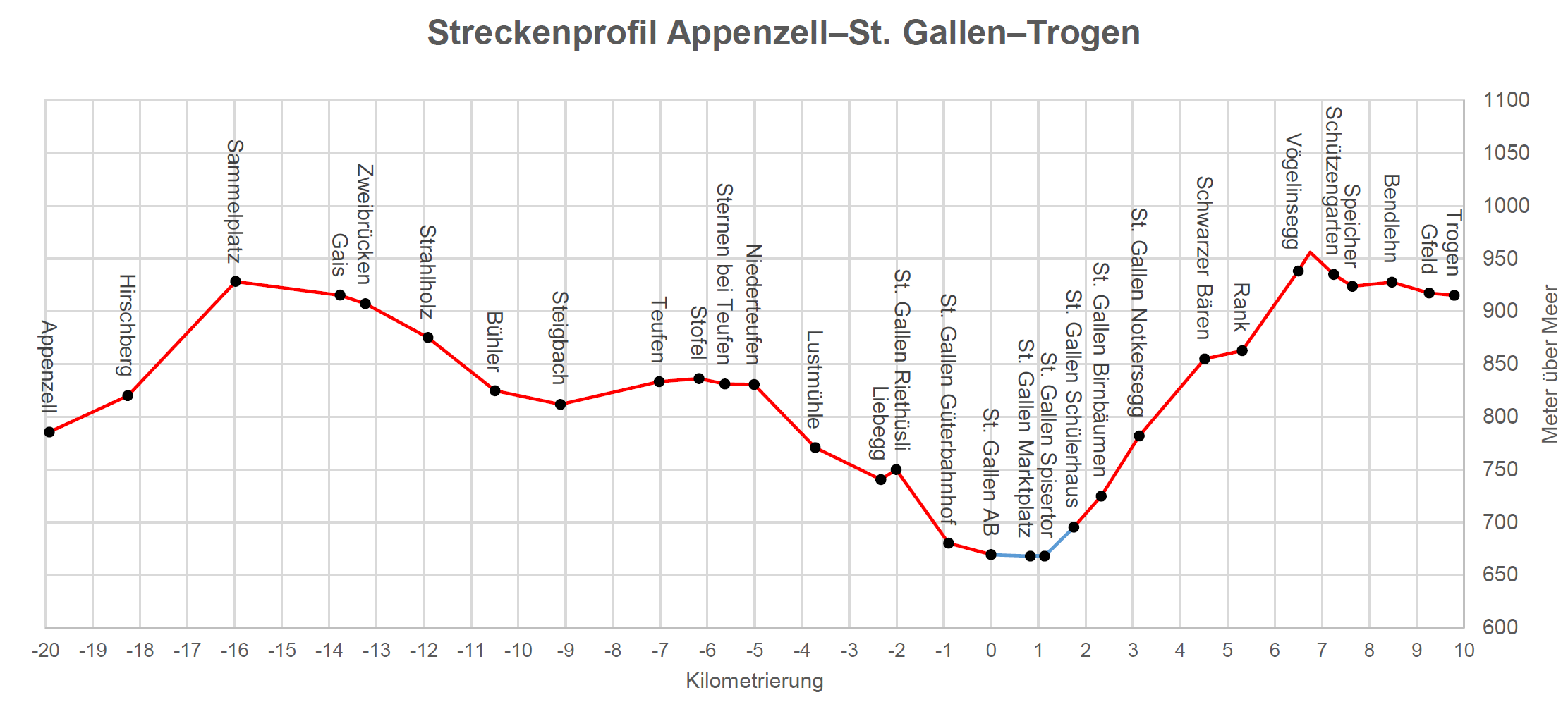 Vereinfachtes Streckenprofil Appenzell–St. Gallen–Trogenblau: Straßenbahnabschnitt in der Stadt St. Gallen